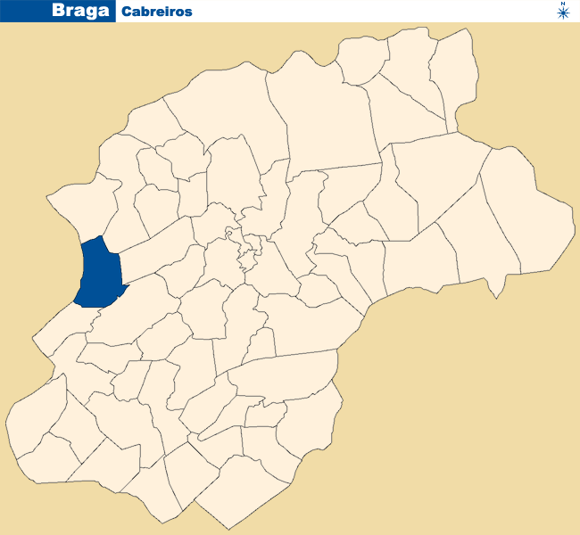 Localização de Cabreiros no concelho de Braga.